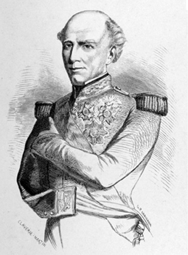 Portrait de Charles Baudin